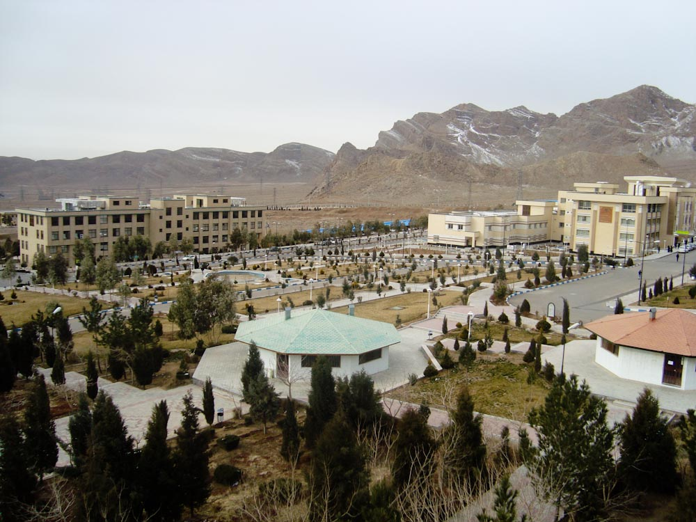 نمایی کلی از دانشگاه آزاد خمینی شهر